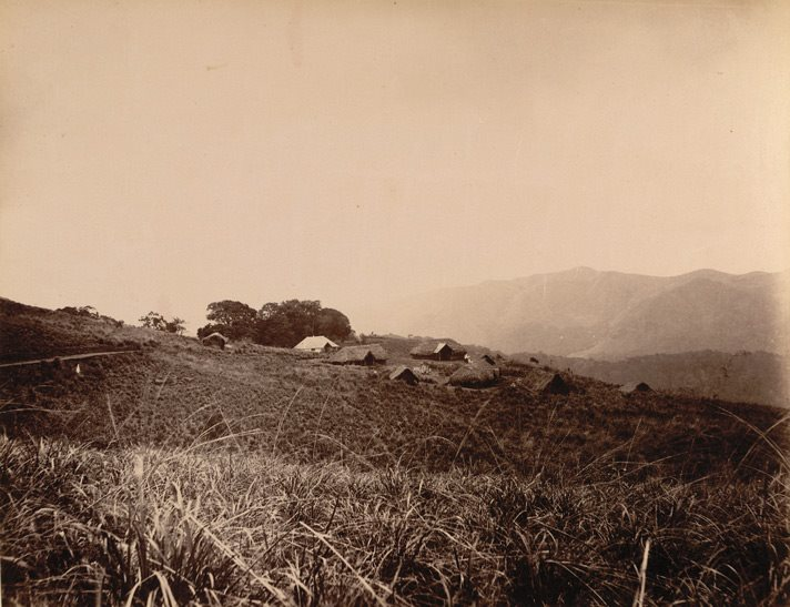 പീരുമേട്, തേക്കടി, കോട്ടയം